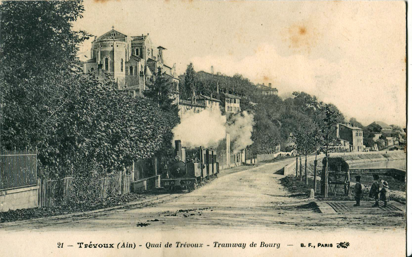 Carte postale ancienne éditée par BF à Paris, n°21 : TRÉVOUX - Quai de Trévoux - Tramway de Bourg